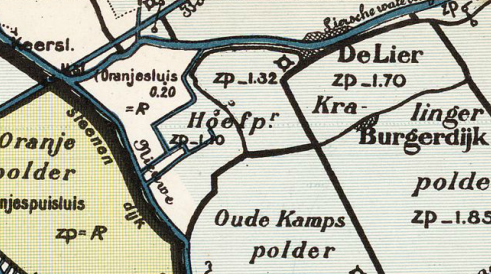 Hoefpolder